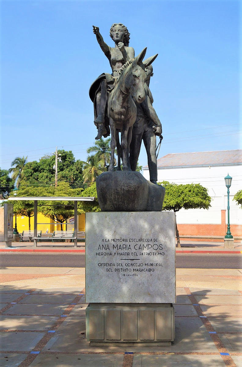 Plaza Ana María Campos, Parroquia Parroquia Santa Lucía. Maracaibo